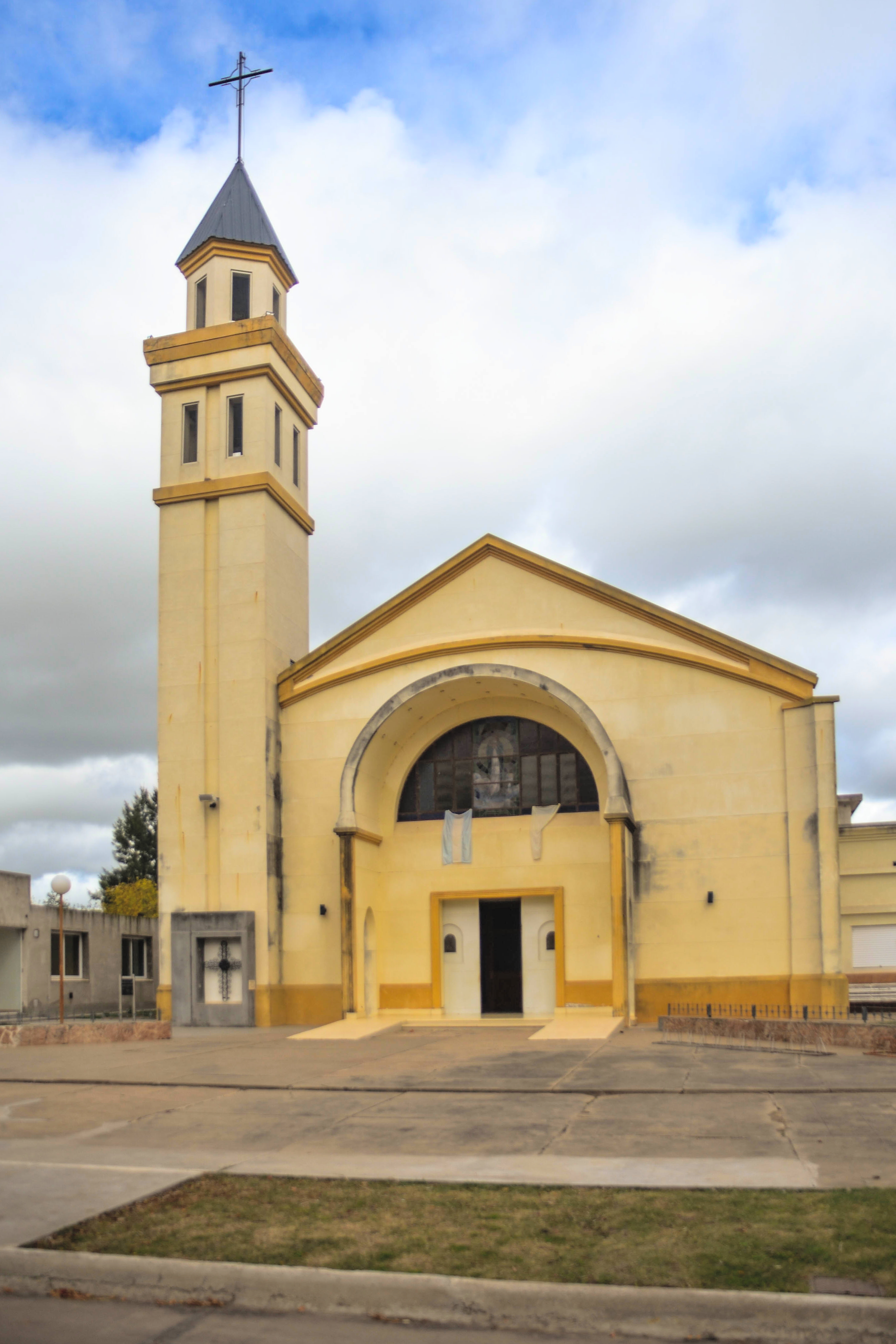 Parroquia Inmaculada Concepción - Comuna de Humboldt (Santa Fe)